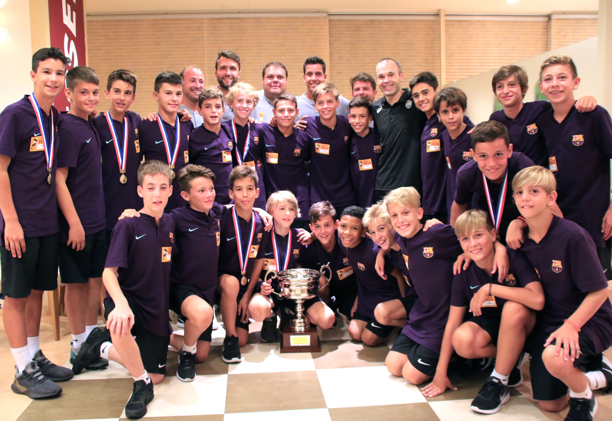 FCバルセロナのインファンティルBに帯同した編集者が撮影したものです